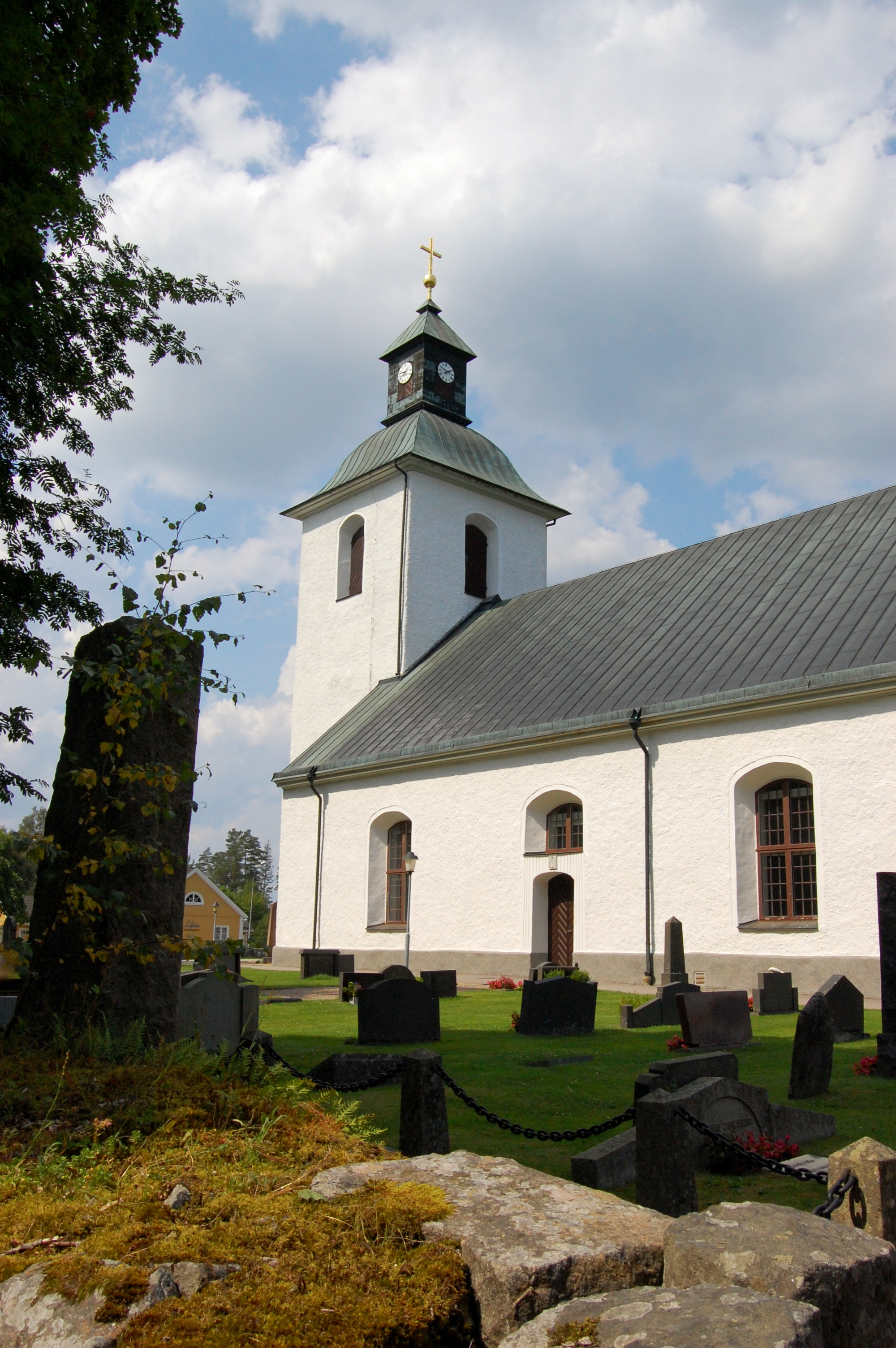 Vislanda kyrka